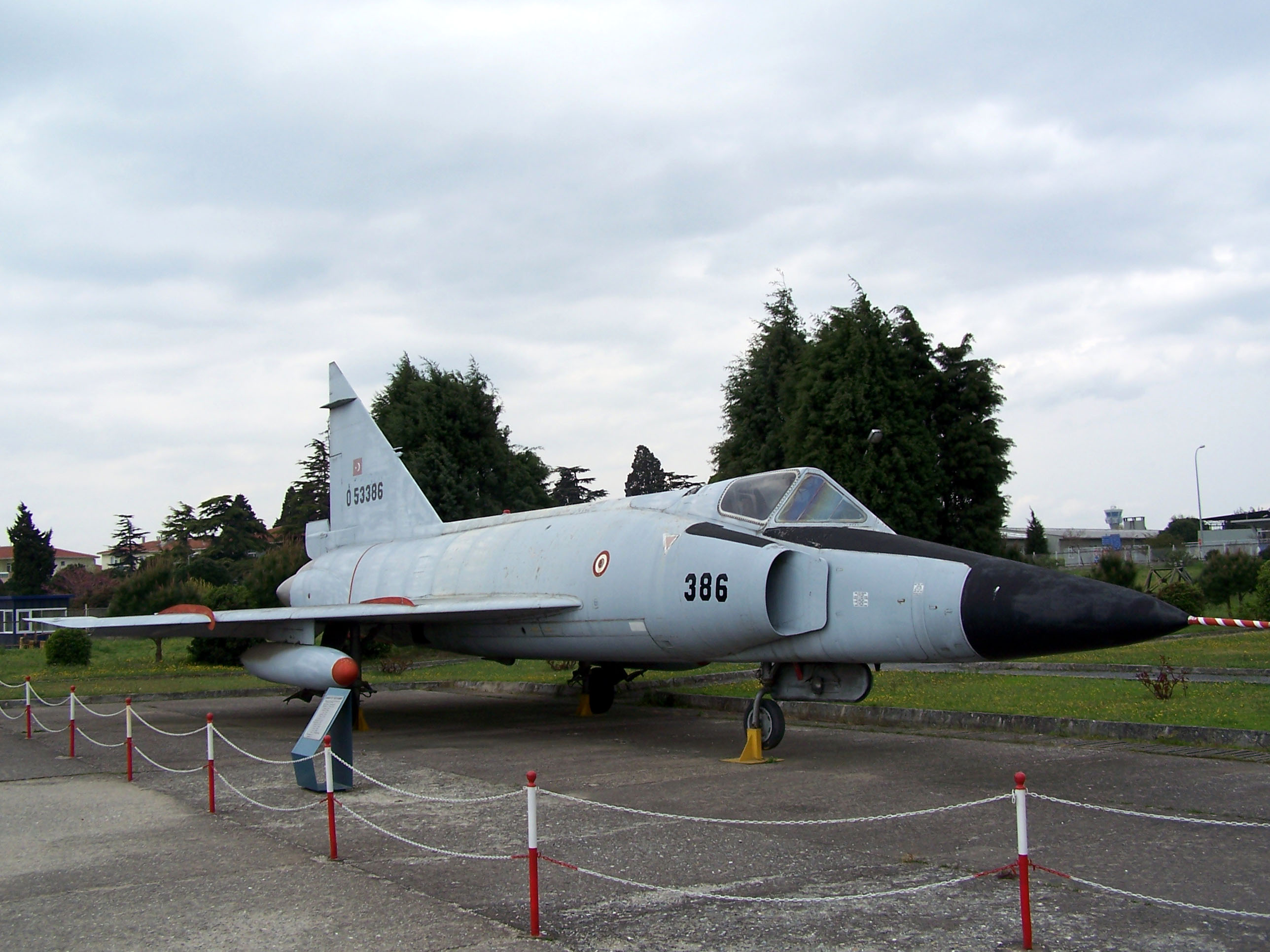 Convair F-102 Delta Dagger in Istanbul Aviation Museum (İstanbul Havacılık Müzesi)